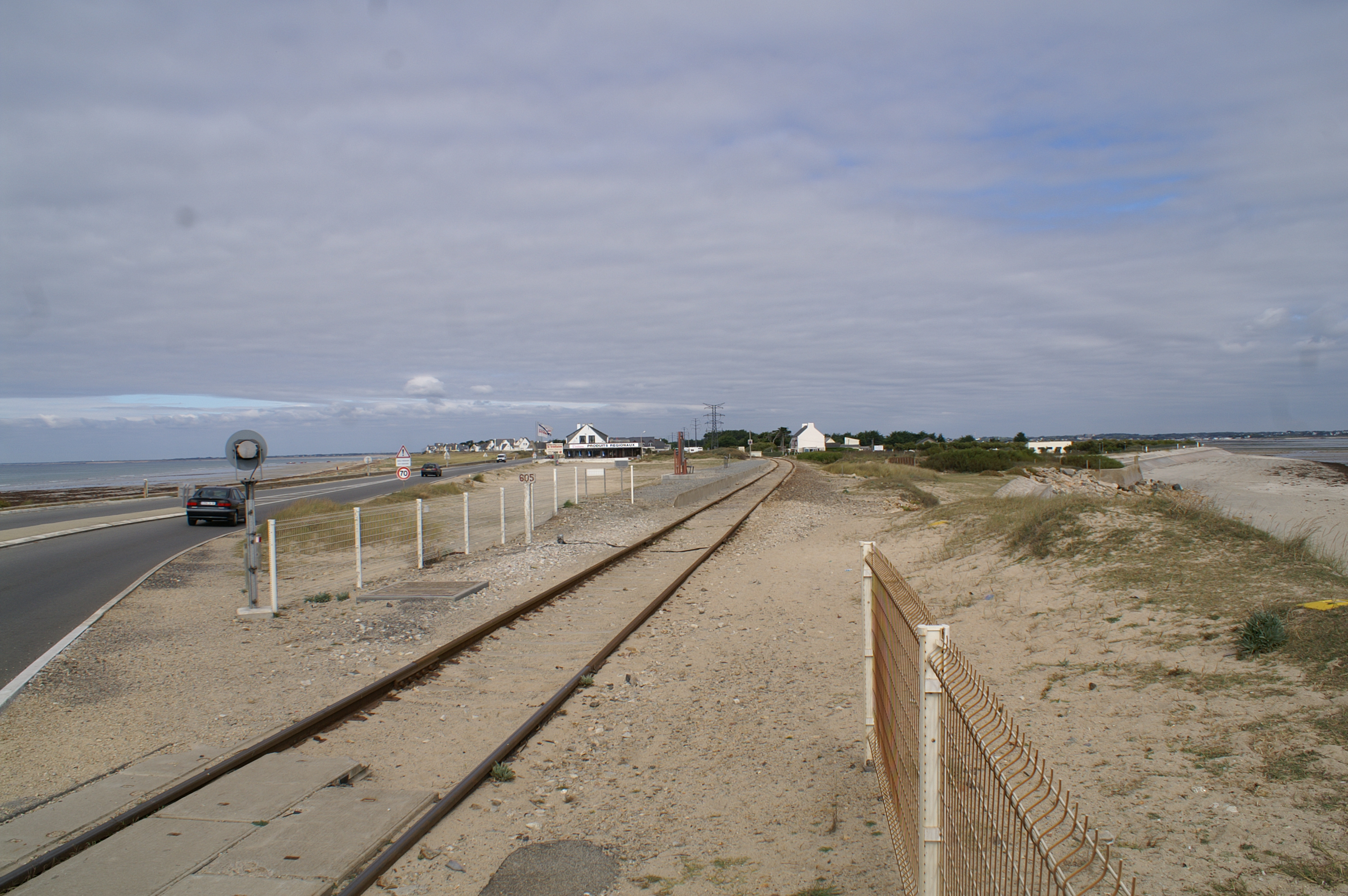 La halte vue du passage à niveau.